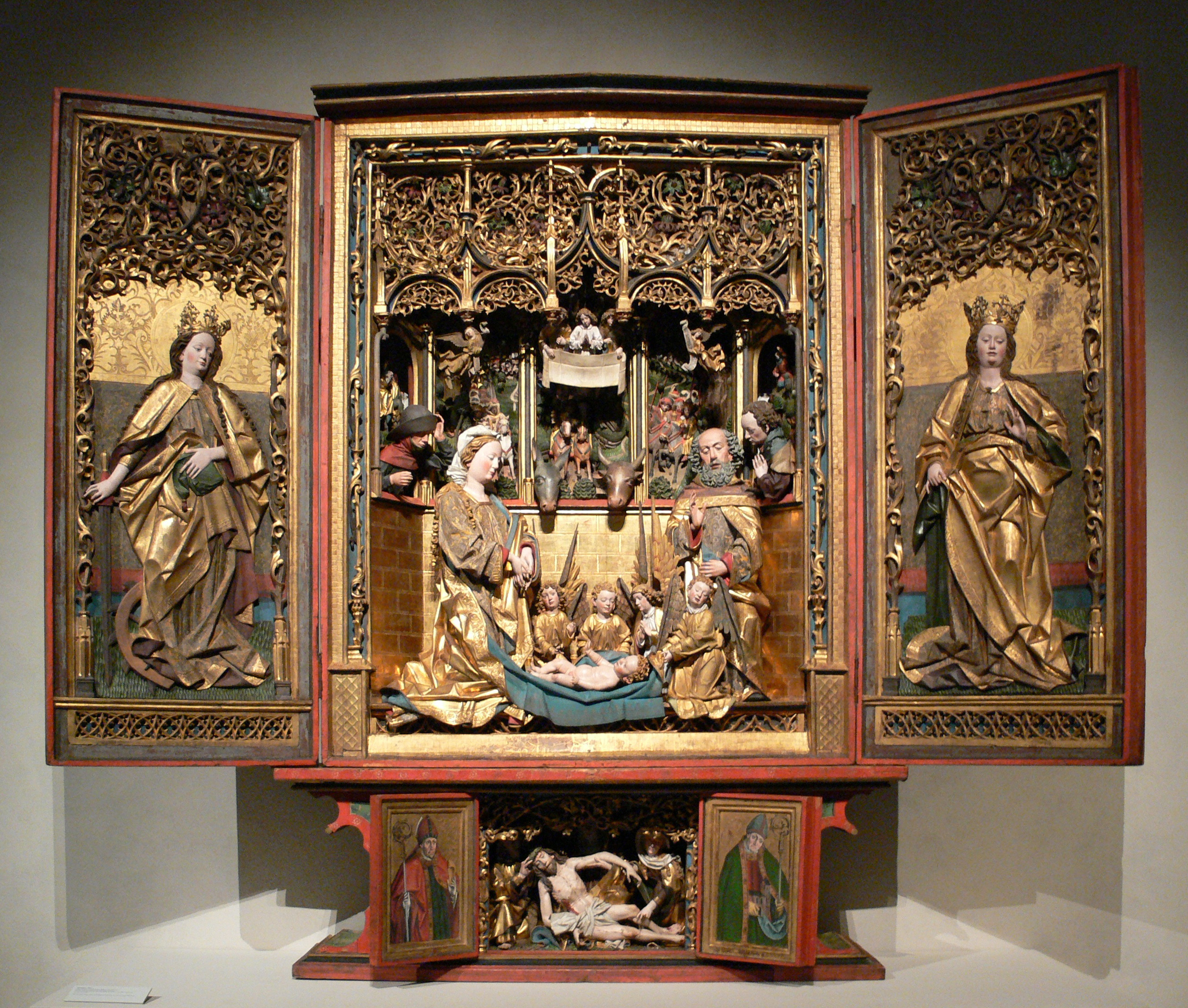 Traminer Altar von Hans Klocker und Werkstatt, Brixen, ca. 1485/1490 Zirbel- und Fichtenholz, originale Fassung, umfassend restauriert 2003-2008 Bayerisches Nationalmuseum, Inv. MA 1952 (bis 1845 Pfarrkirche Tramin; 1856/1857 aus der Sammlung Max Ainmiller erworben) Gesamtansicht